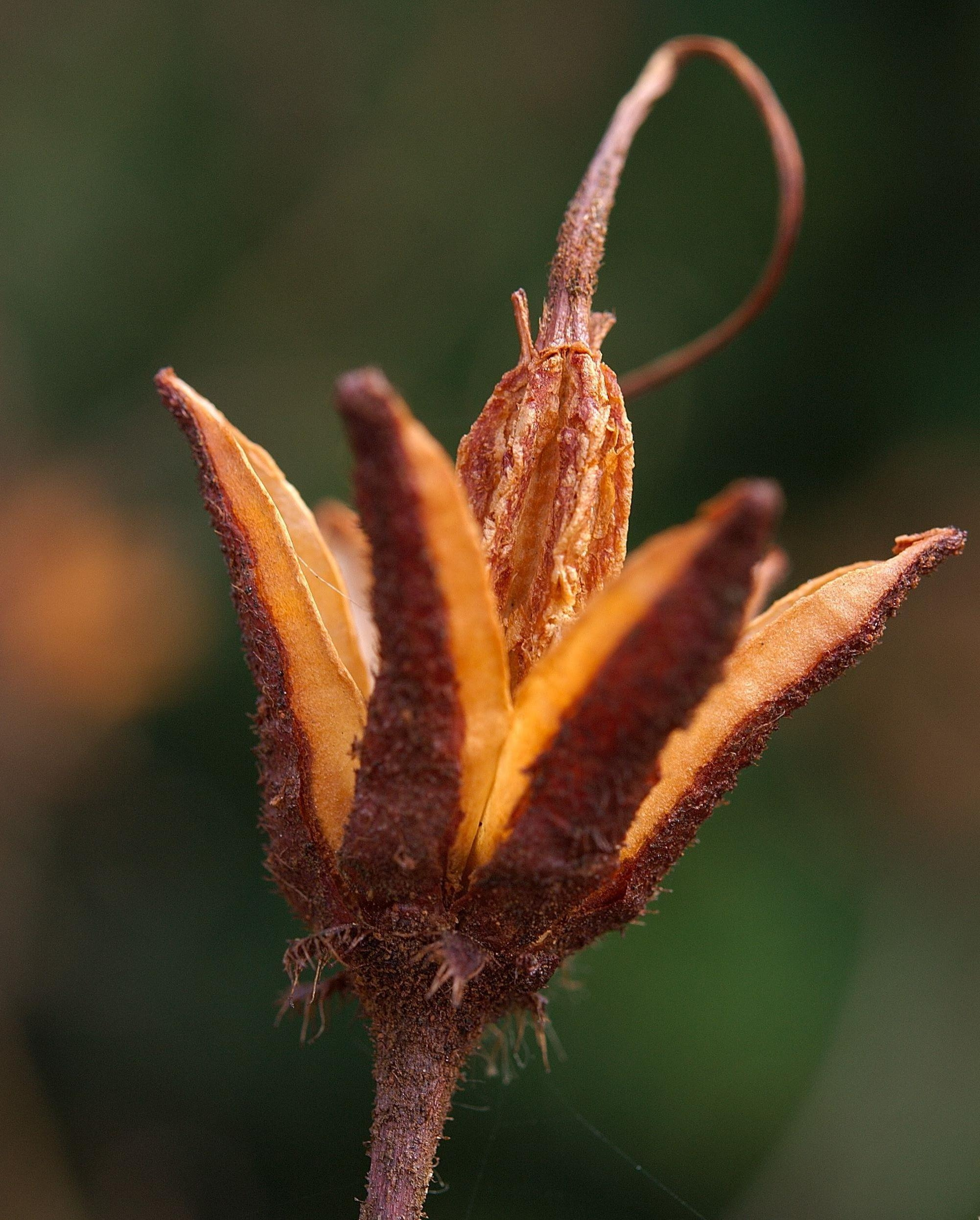 Gullasalea (Rhododendron luteum) fra Botanisk hage i Oslo.